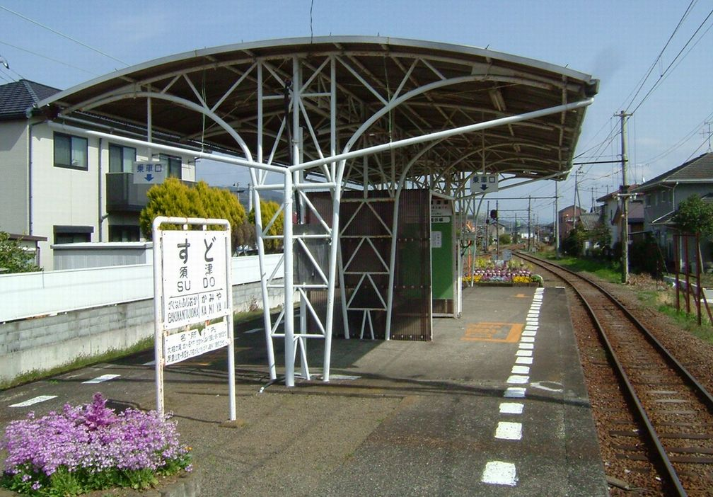 須津駅…